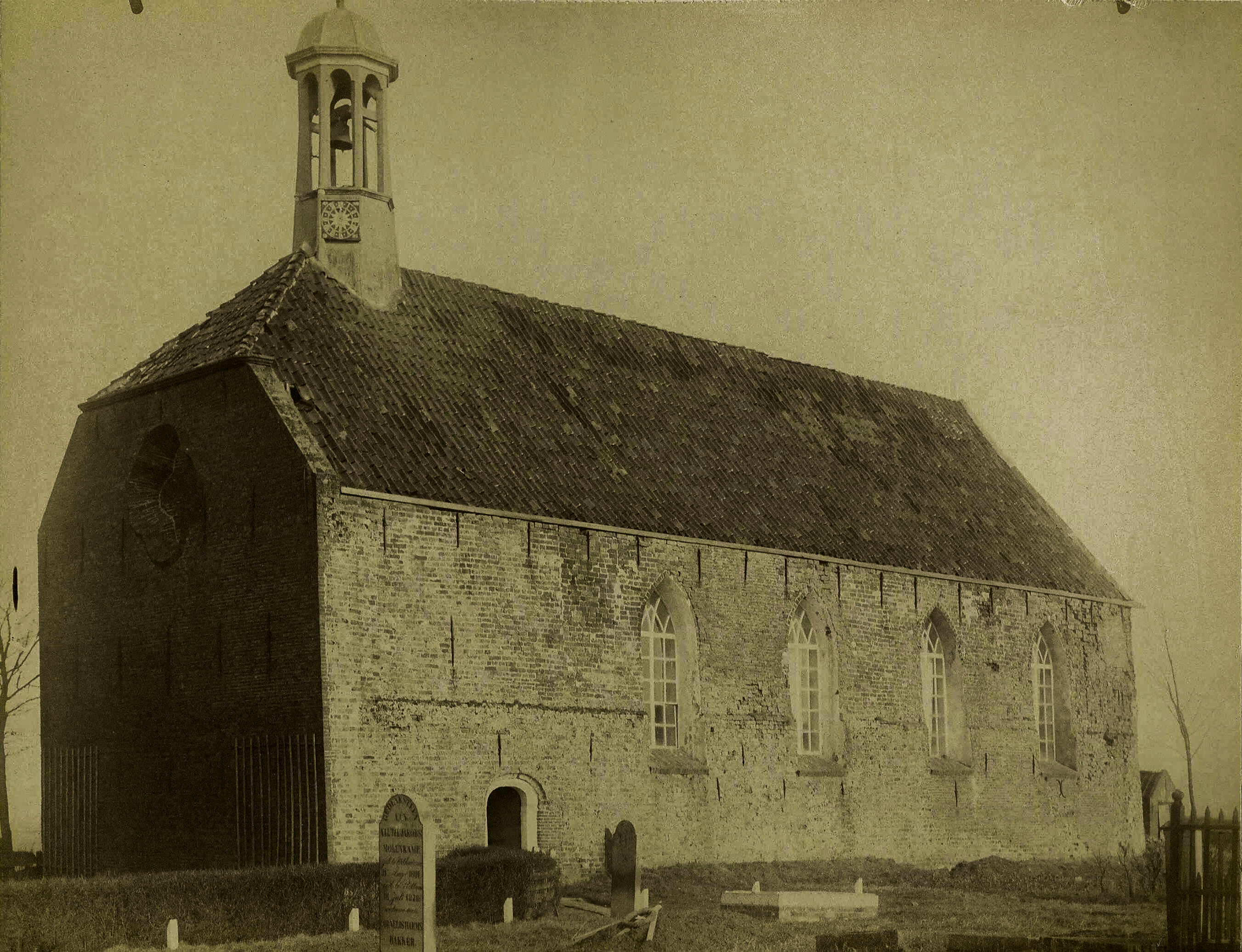 Kloosterkerk Rottum vóór de afbraak in 1885. Iets aangepast om contrast en detail meer zichtbaar te maken.